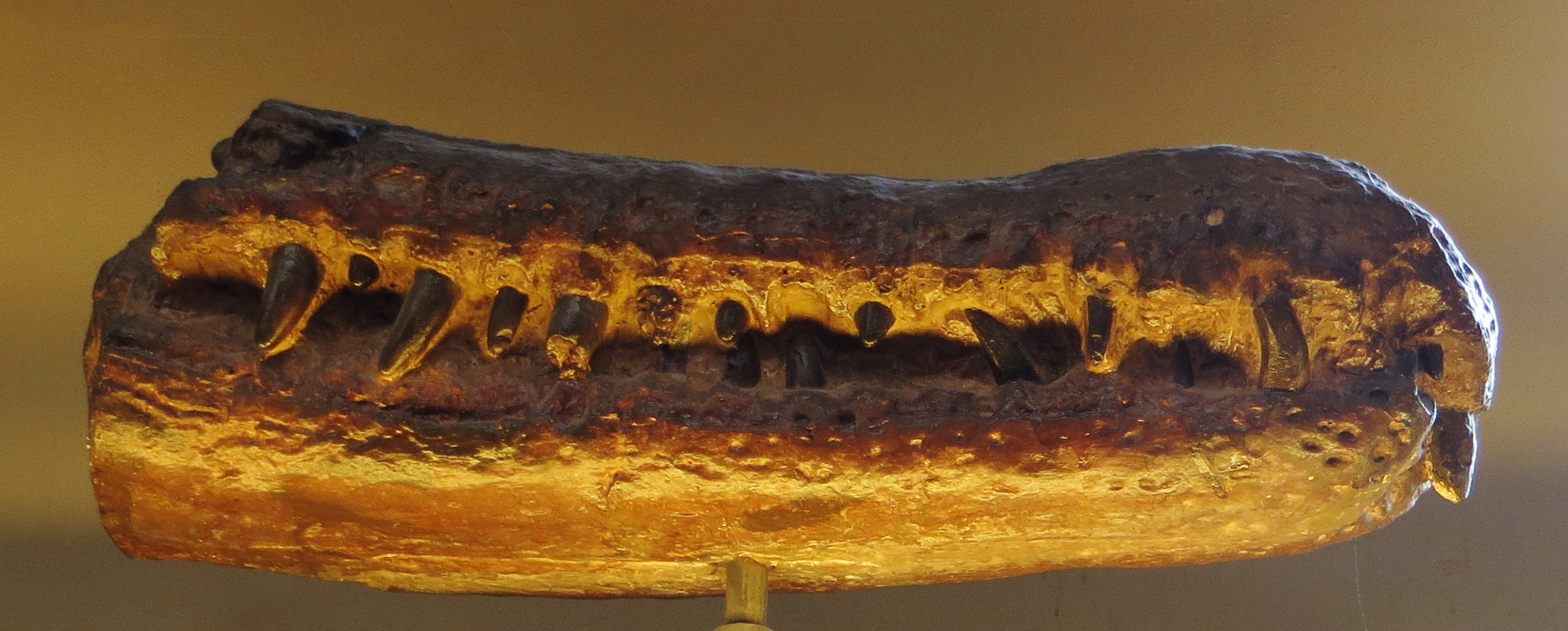 Fossil of Rhamphosuchus, an extinct reptile- Took the photo at Musee d'Histoire Naturelle, Paris